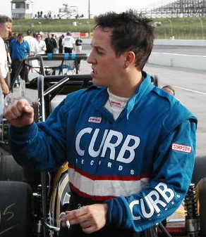 Tyler Walker at IRP